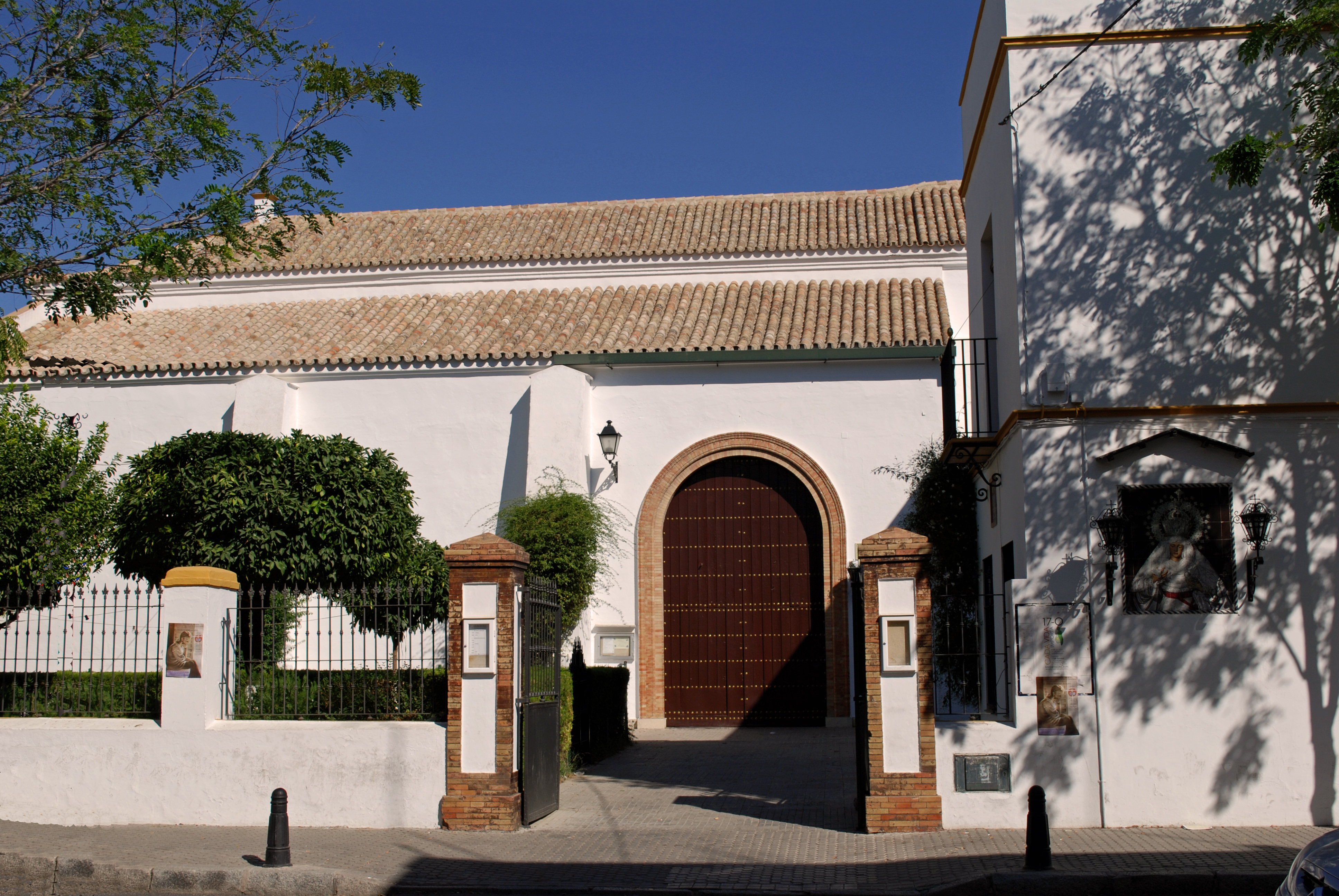 Iglesia de San Sebastían, Sevilla